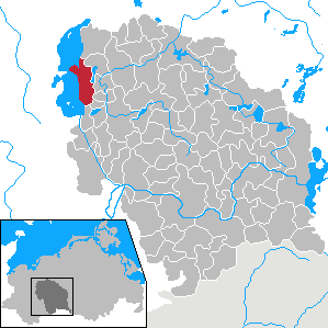 Leezen in Mecklenburg-Vorpommern - District Parchim